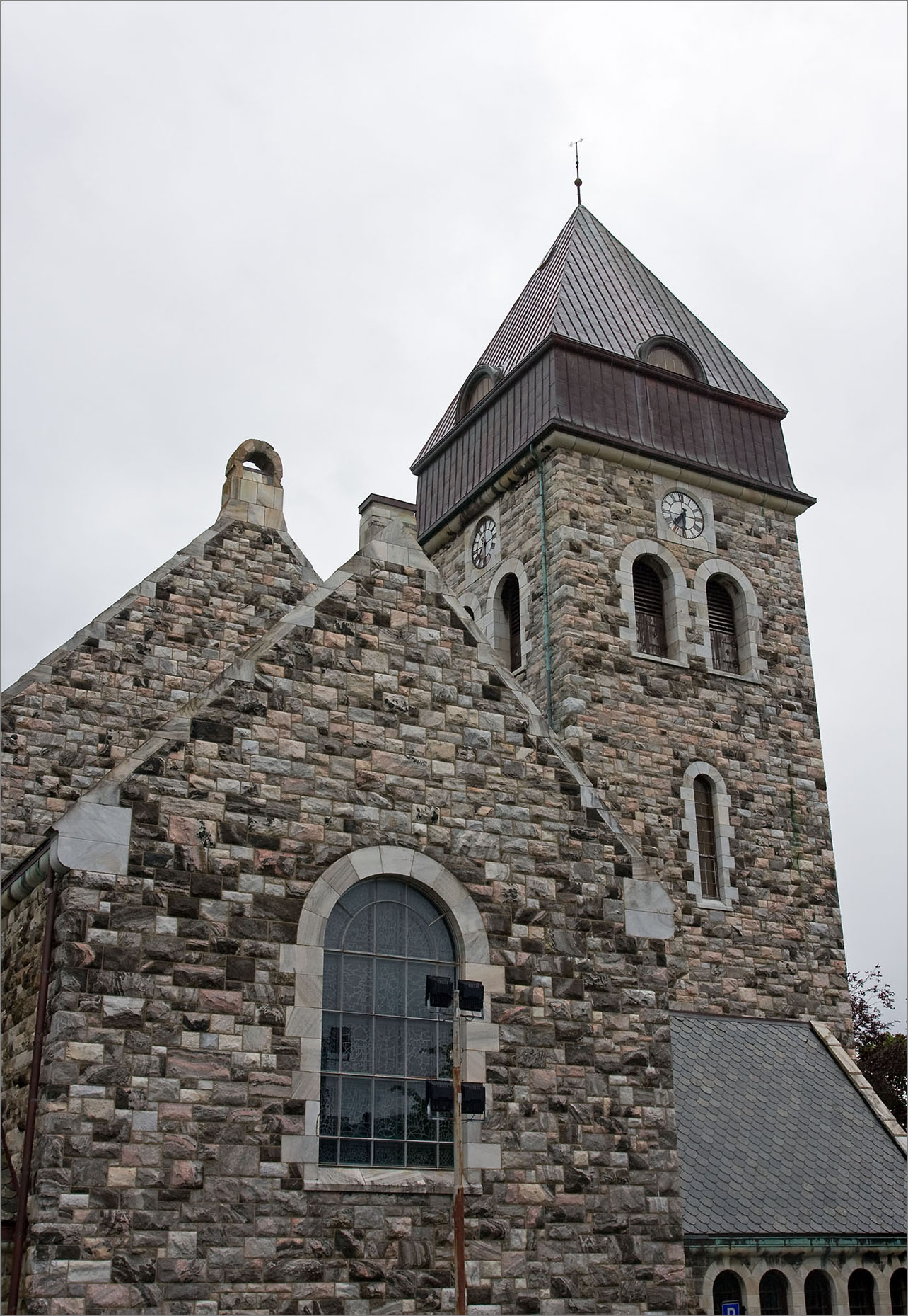 Alesund Church / Alesund, Norway